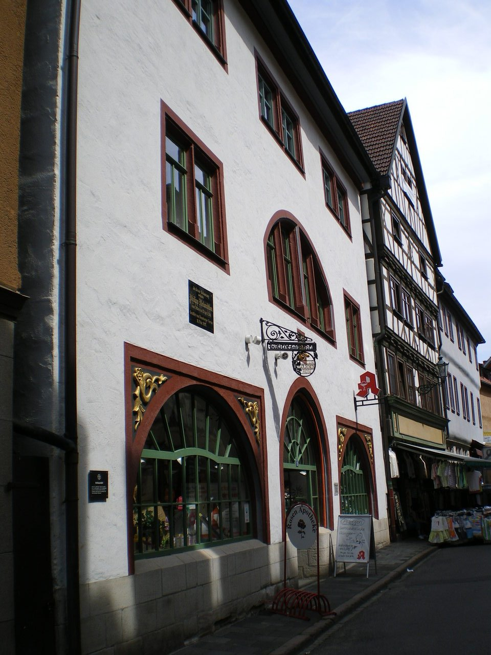 Melanchthon House in Schmalkalden, Germany